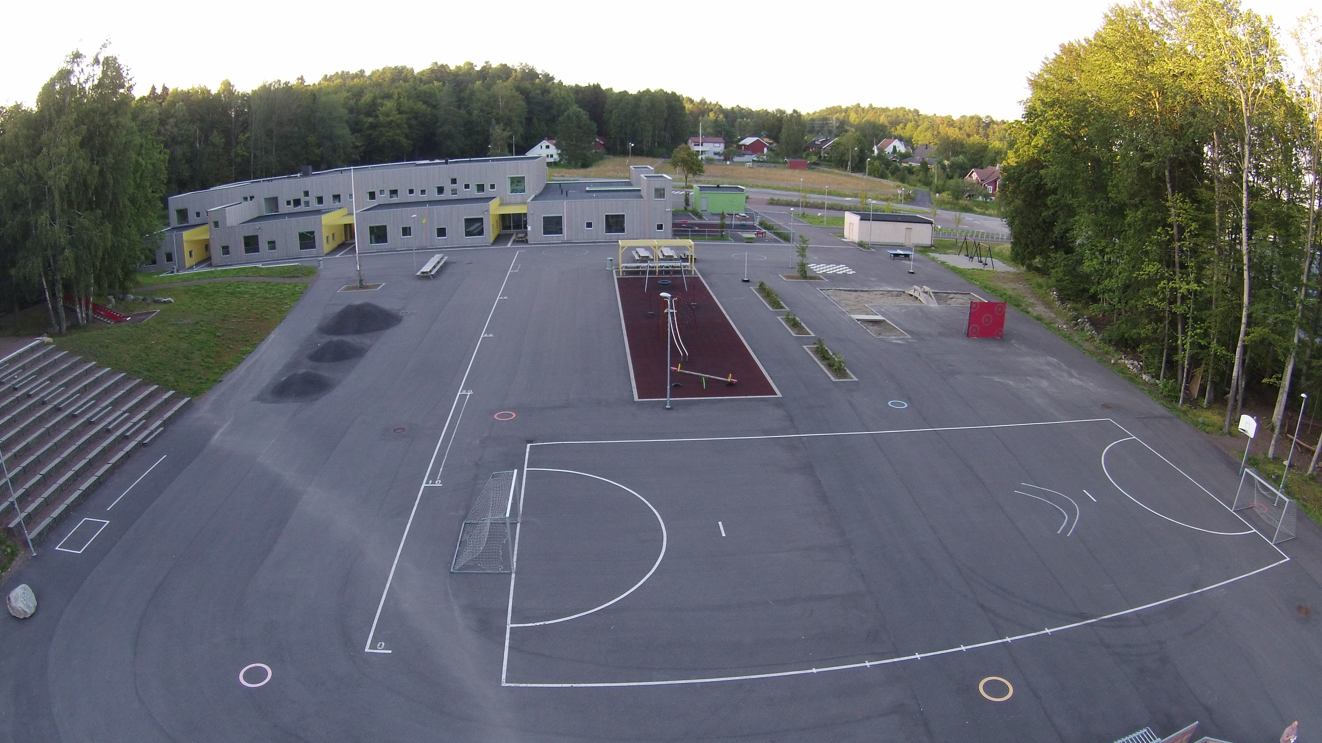 Dronefoto av skolegården på Brattås skole